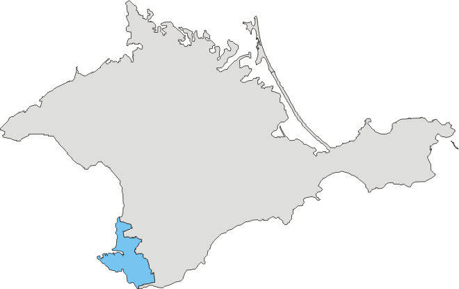 Карта-схема Крымского полуострова. Выделена территория Севастопольского городского совета (Севастополь не входит в состав Автономной Республики Крым)